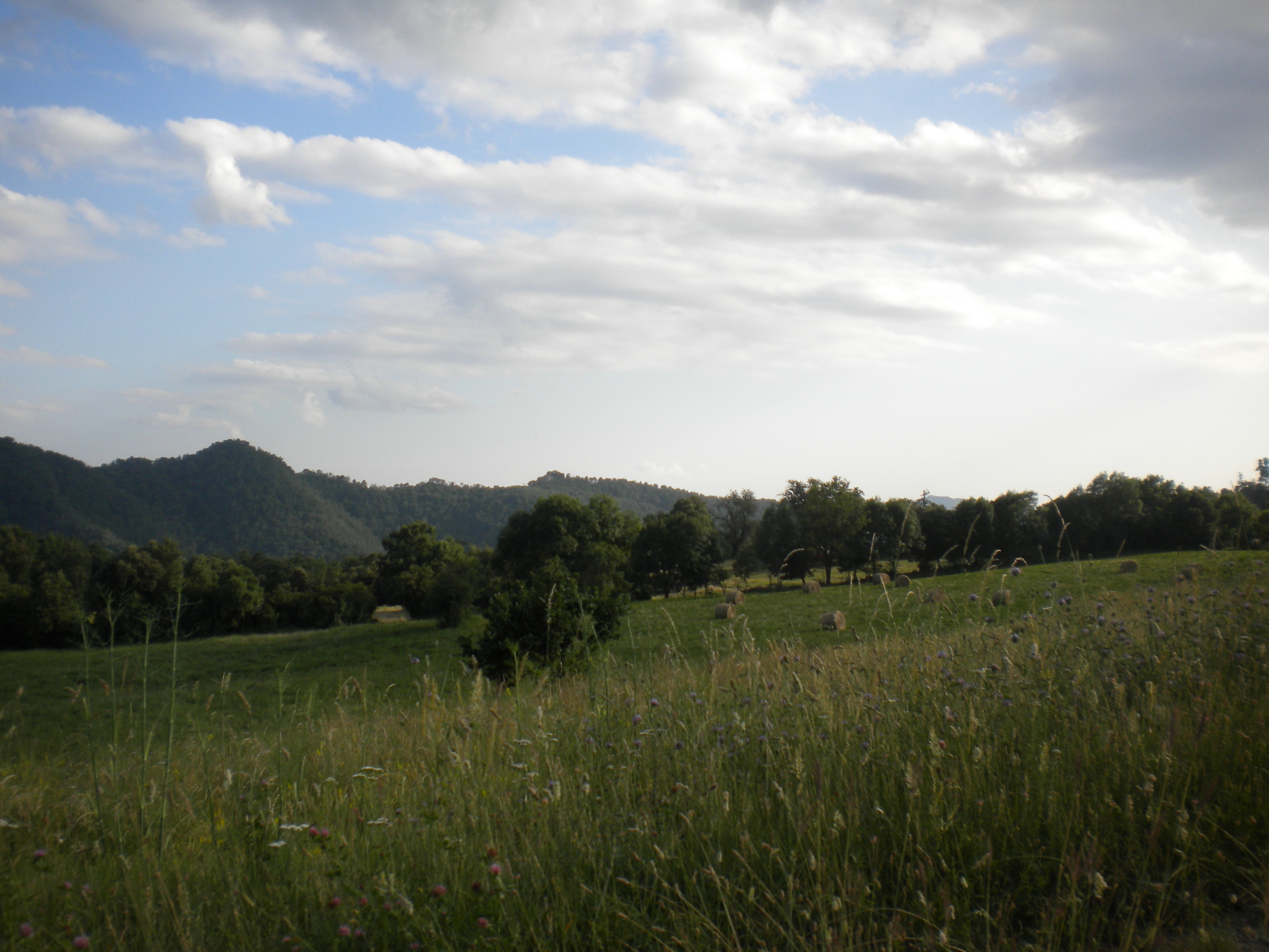 Bales de palla als Quintans de la Vila de Llaés, amb la serra de Bufadors al fons. Terme municipal de Ripoll, al Ripollès.